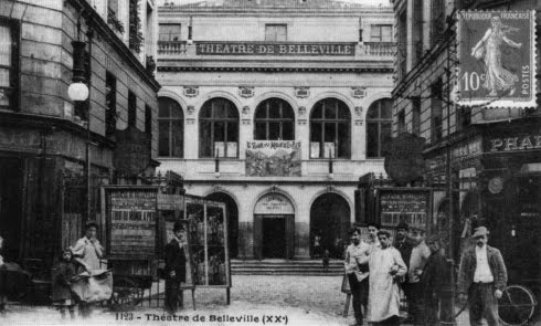 Vue du Théâtre de Belleville inauguré le 25 octobre 1828 et démoli en 1932.